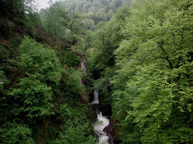 Pozo de Amo en el río Saja, Cantabria (España).